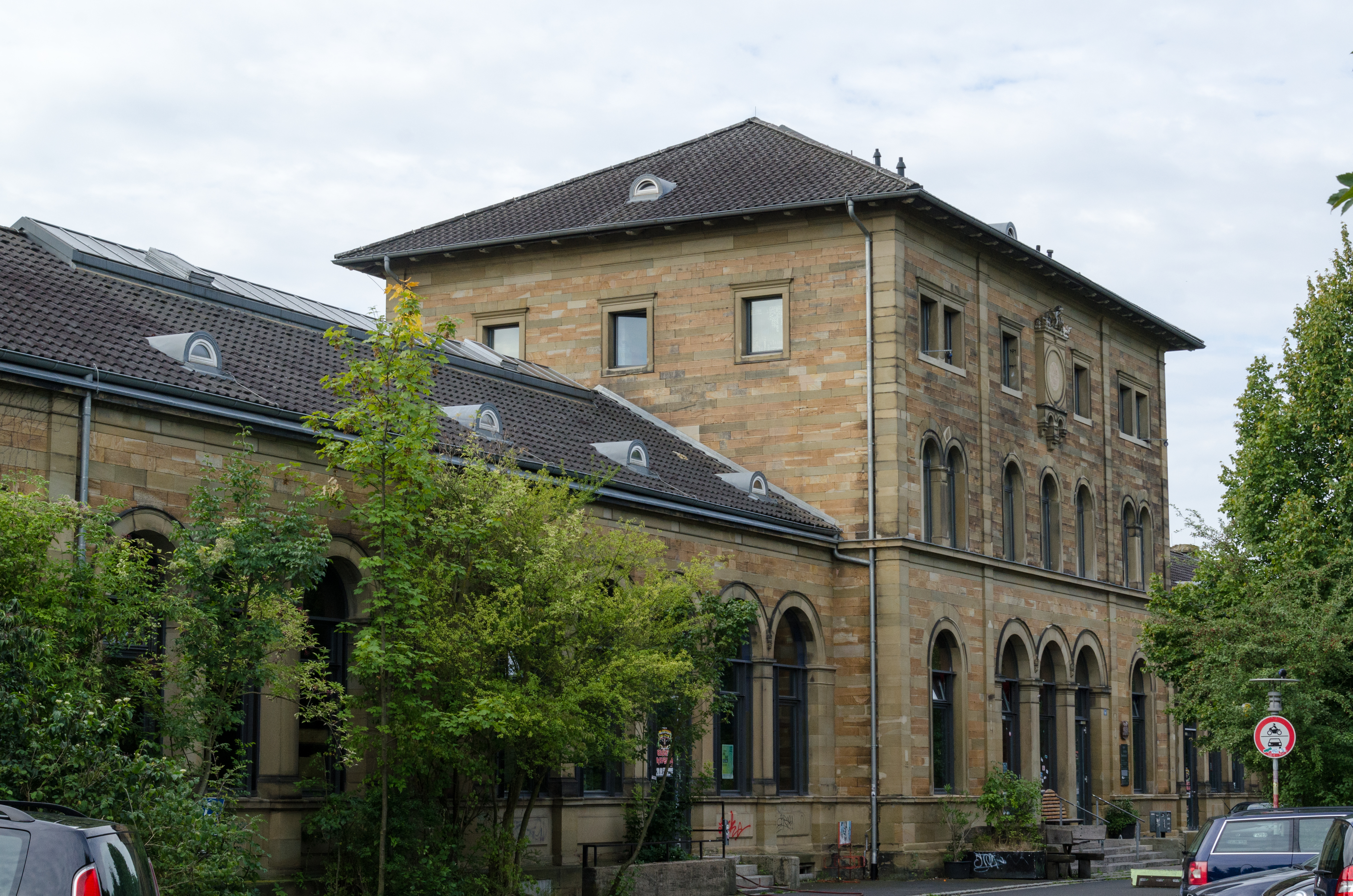 Schweinfurt, Alte Bahnhofstraße 12